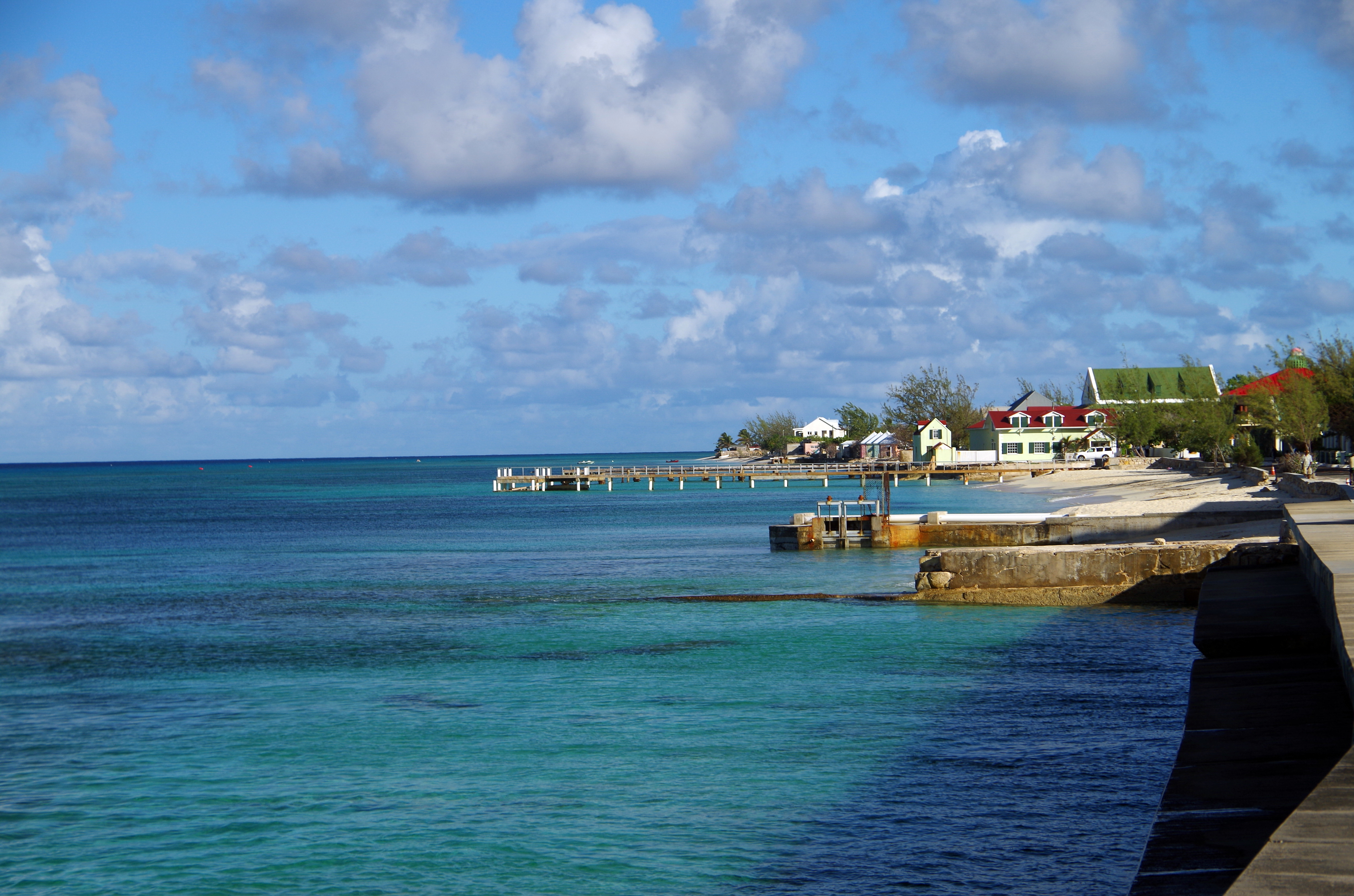 Strand bei Cockburn, Grand Turk